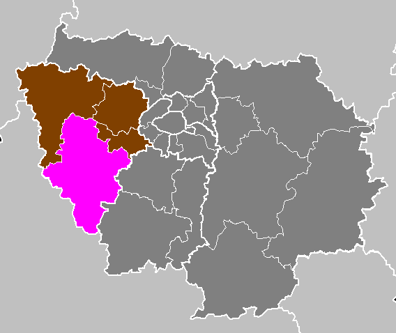 Maps of arrondissements and cantons of France: Département des Yvelines - Arrondissement de Rambouillet.PNG (Région Île-de-France)